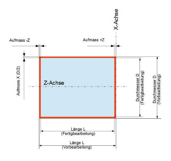 Schematische Darstellung von Vorbearbeitungsmassen, Fertigbearbeitungsmassen und Bearbeitungszugaben (Aufmasse) eines Drehteiles.